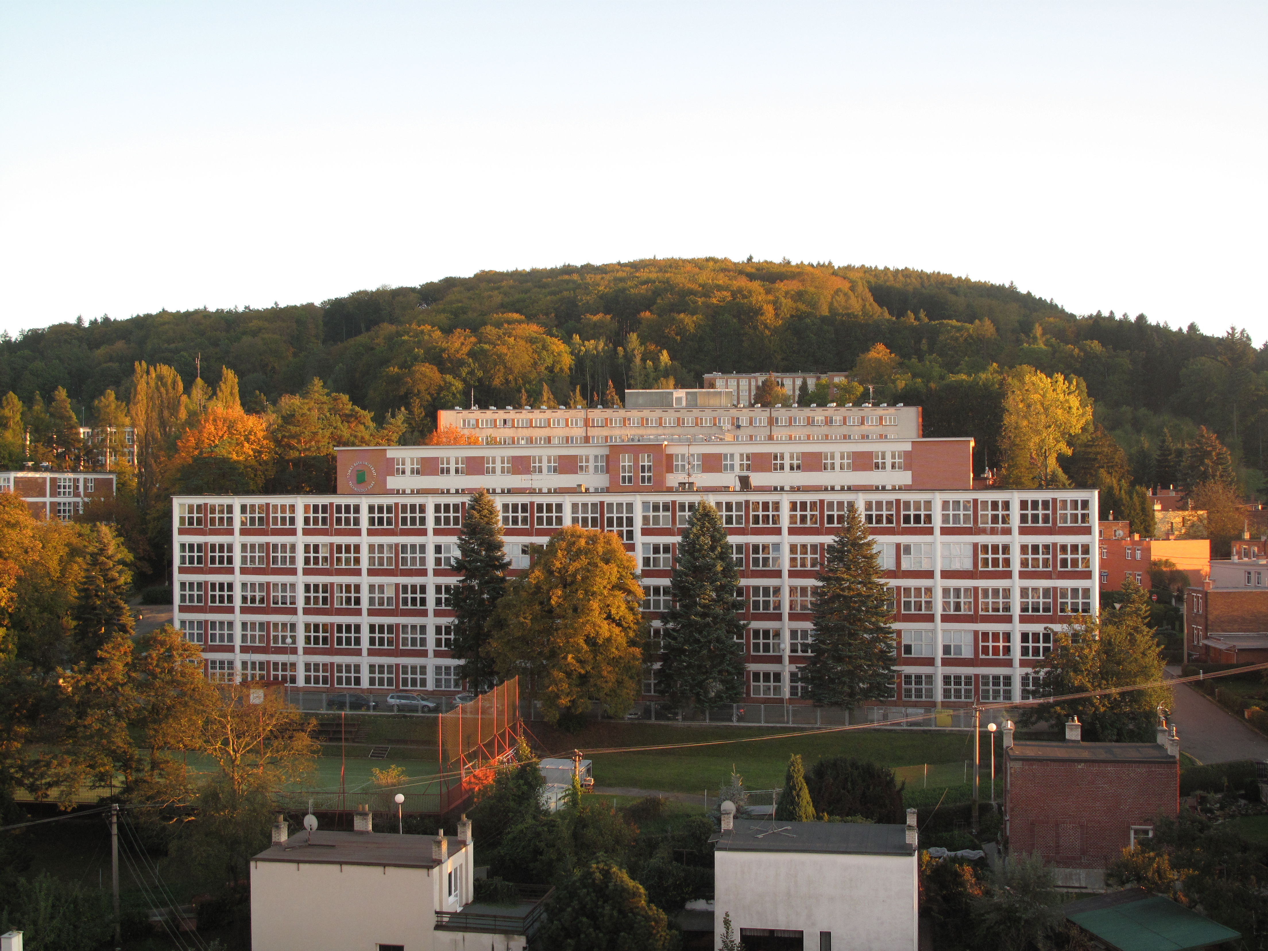 Zlín